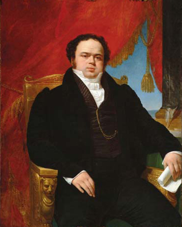 Retrato del chileno Mariano Egaña realizado en París en 1827. Egaña fue el principal redactor de la Constitución de Chile de 1833